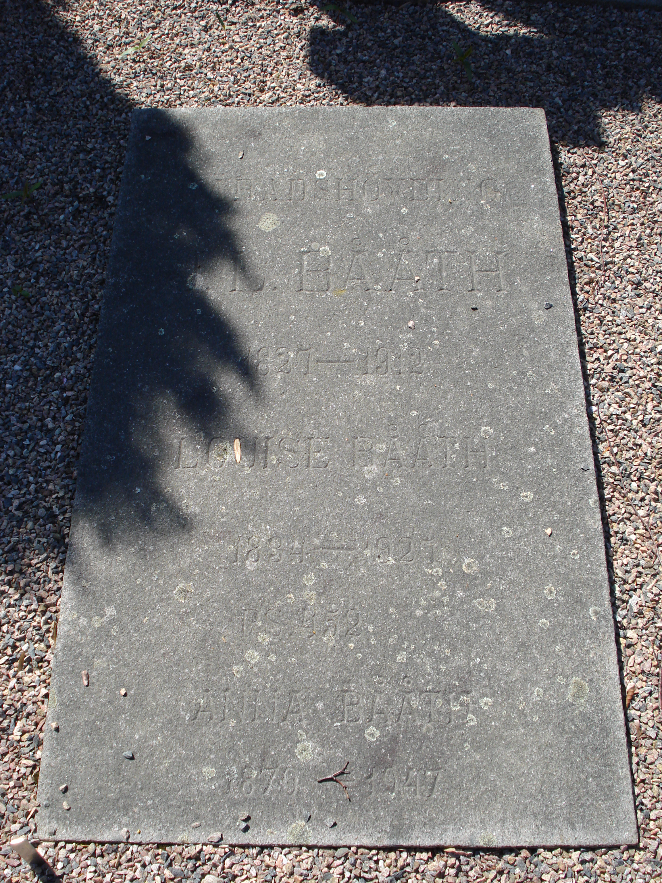 Gravsten för Johan Ludvig Bååth och hustrun Louise Bååth på Donationskyrkogården i Helsingborg.